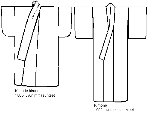 Kosode ja/tai kimono